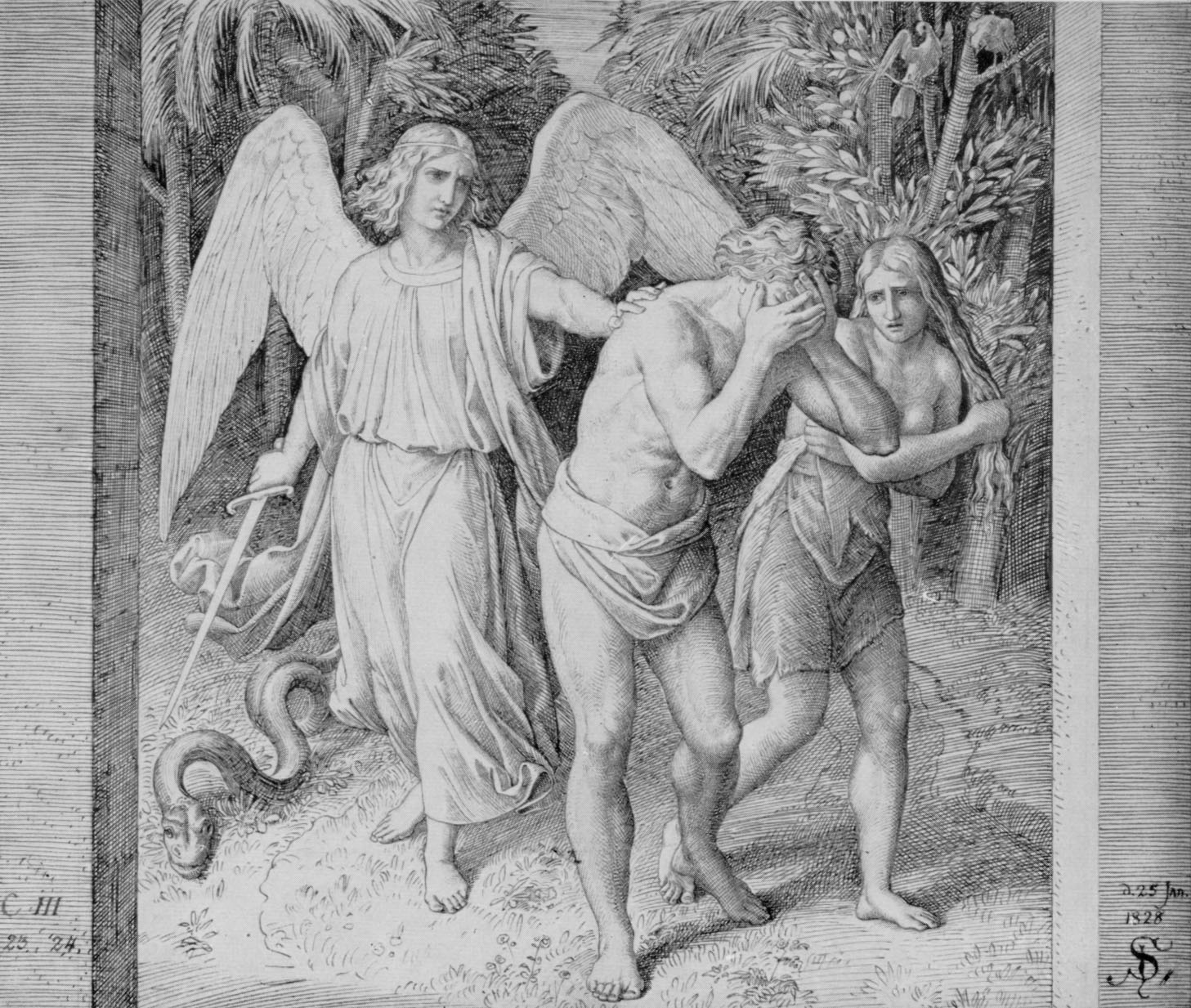 Früher Entwurf zur Verstoßung, aus der Bibel in Bildern. Federzeichnung, 25. Jan. 1828